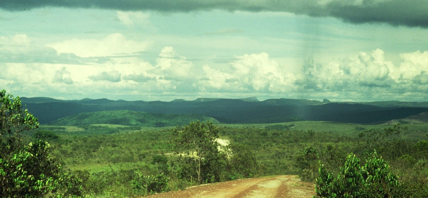 La Gran Sabana, Estado Bolívar, Venezuela en la vía que comunica a Santa Elena de Uairén con Icabarú. Puede verse al fondo el tepuy denominado Peraitepuy con un anticlinal vaciado por la erosión, ejemplos de relieve invertido (ubicado por detrás de una pequeña cortina de lluvia